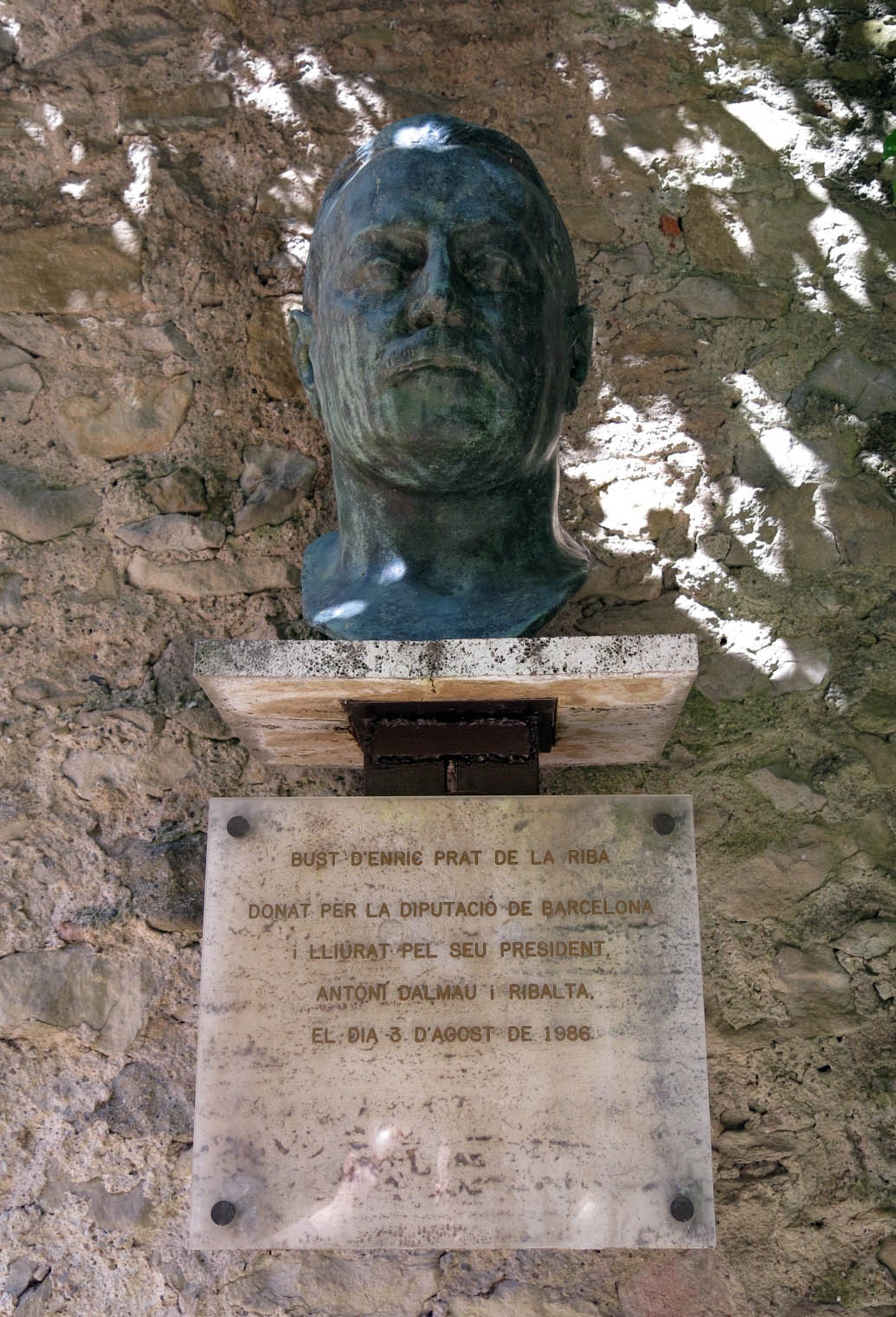 Casa Prat de la Riba (Castellterçol) Object location41° 45′ 05.38″ N, 2° 07′ 10.01″ E